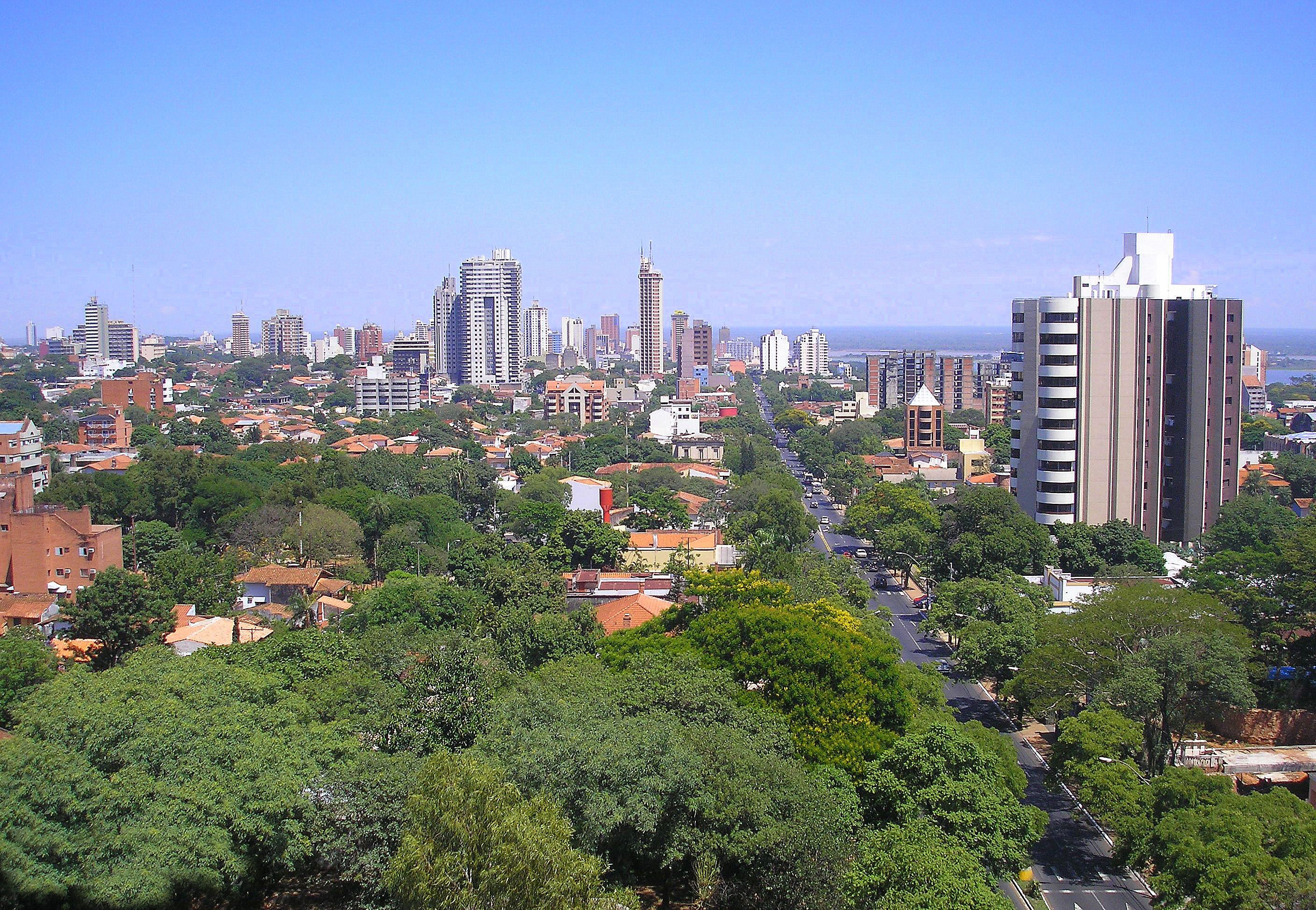 Vista panorámica del centro de Asunción y la avenida Mariscal López de la capital de Paraguay.